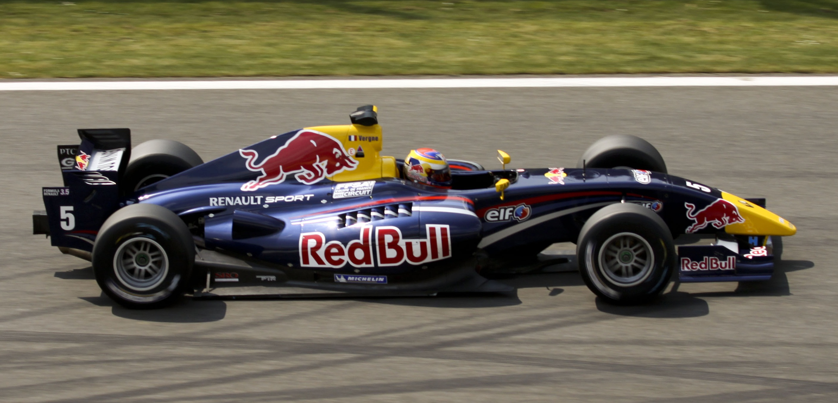 Jean-Éric Vergne in Formula Renault 3.5 Series at Circuit de Spa-Francorchamps in 2011. Original description from flickr: Formula Renault 3.5 Series